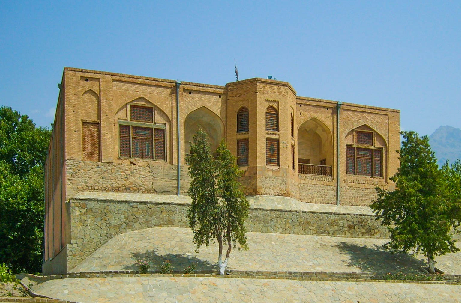 Juma mosque in Ordubad (Azerbaijan). Built in 1604.